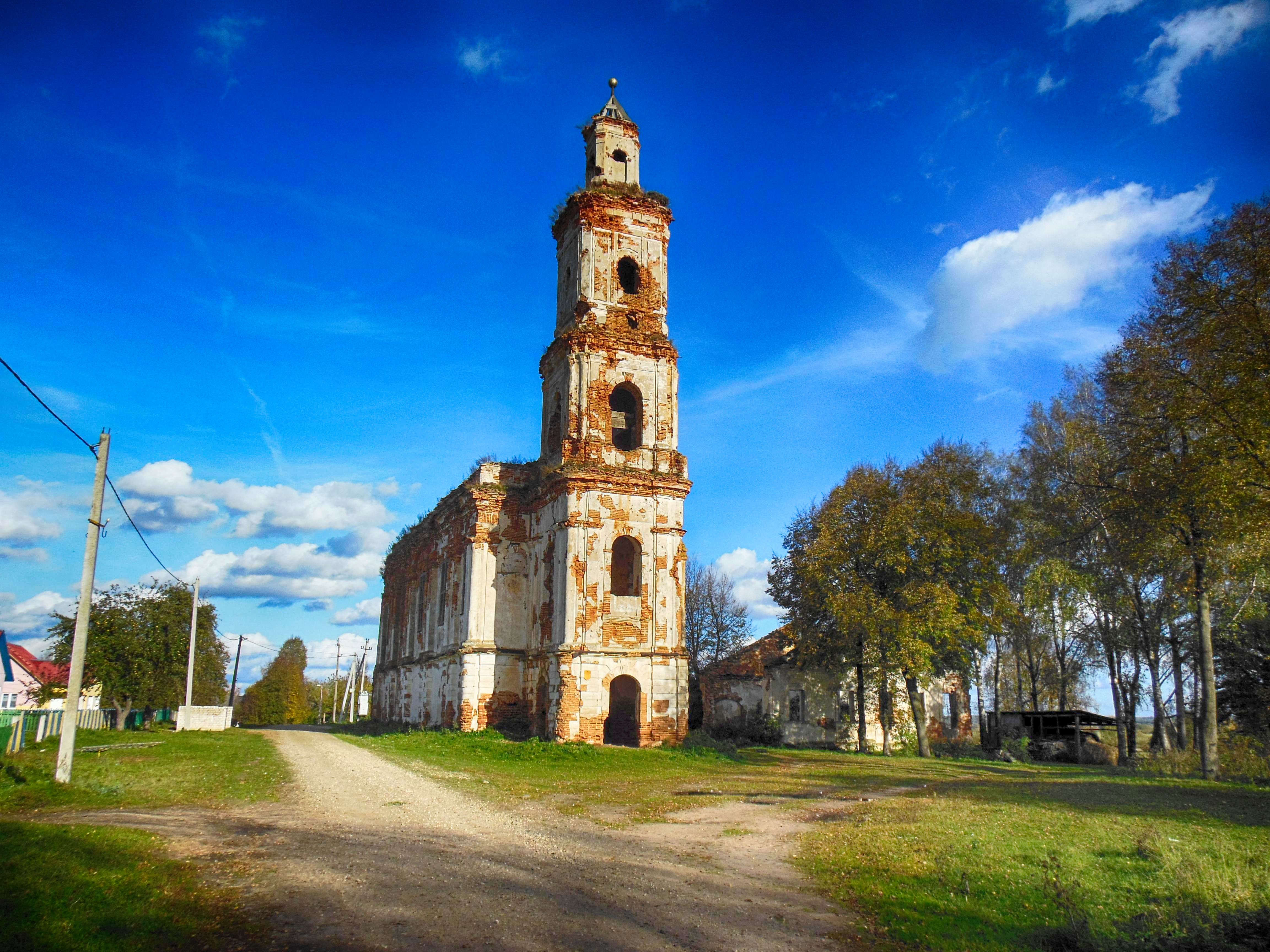 Беларуская (тарашкевіца): Царква. в. Сялец (Ануфрыева) This is a photo of Belarusian heritage monument. Reference number: 512Г000518 ( WLM)